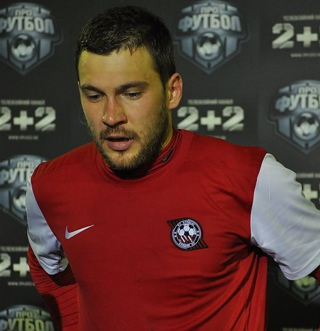 Володимир Володимирович Прийомов — український футболіст